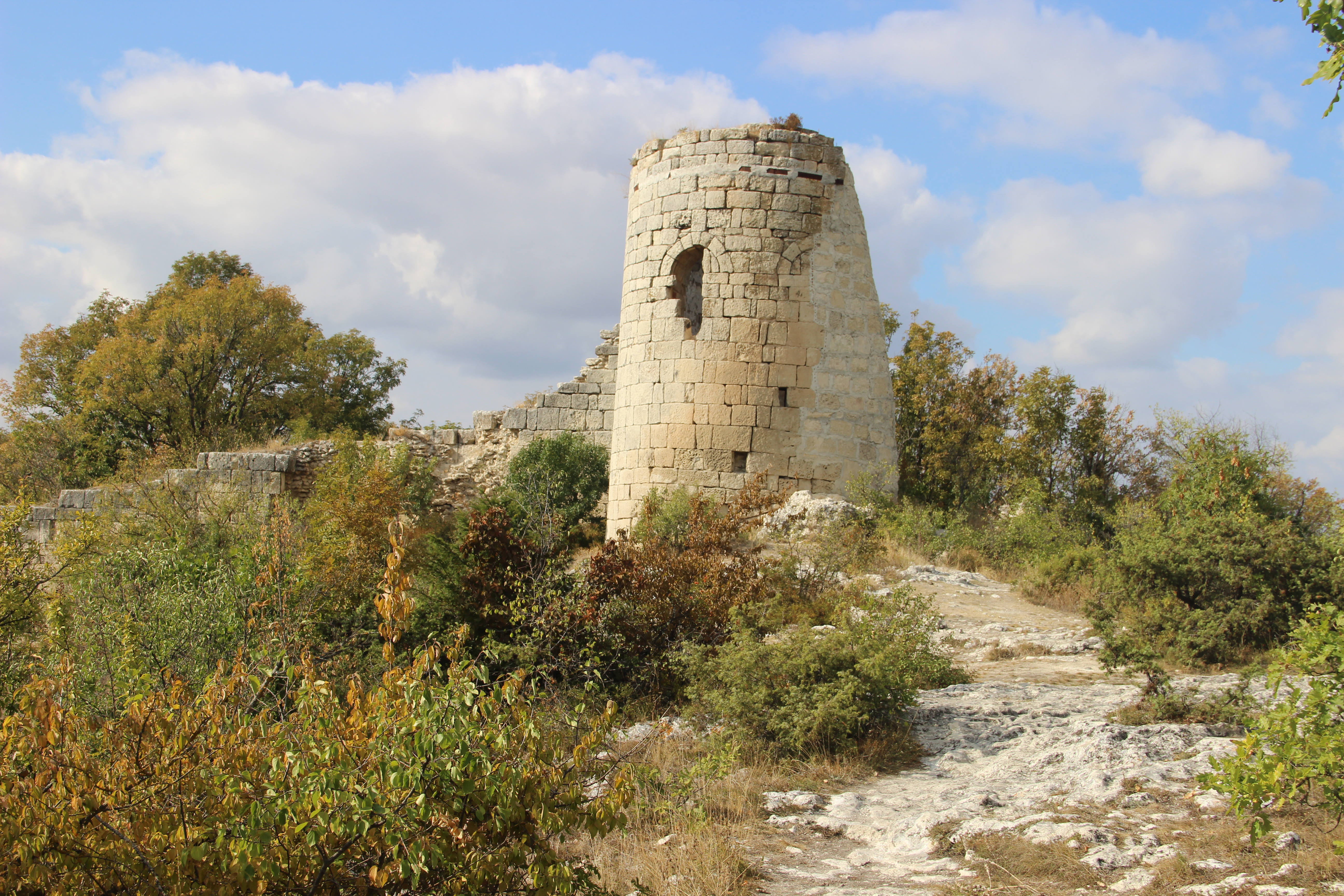 Башня Сюйреньской крепости. Б.Садовое. Бахчисарайский р-н. Крым. Россия. Сентябрь 2014